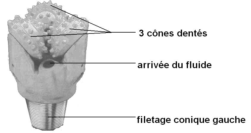 tricone